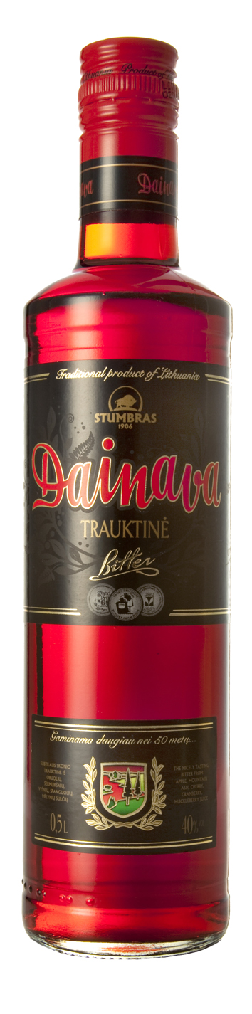 Garantuotas tradicinis gaminys